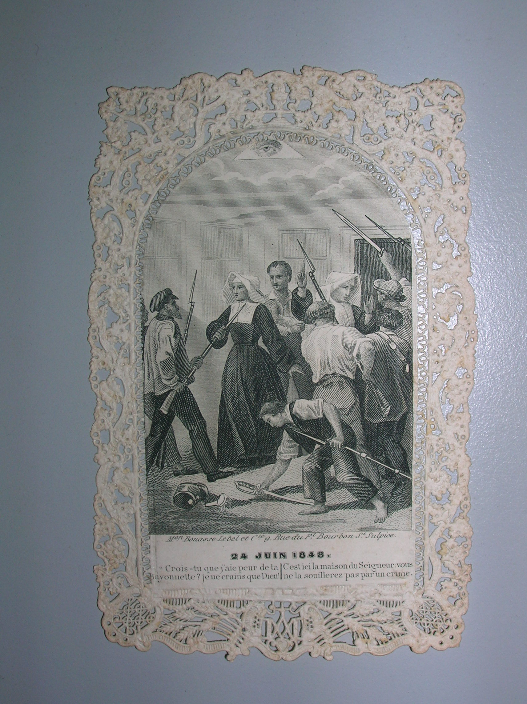 Les filles de Saint Vincent de Paul sauvent un officier de la garde mobile au faubourg Saint Marceau. Image pieuse de la Maison Bouasse-Lebel & Cie. Conservée à la Bibliothèque du Saulchoir